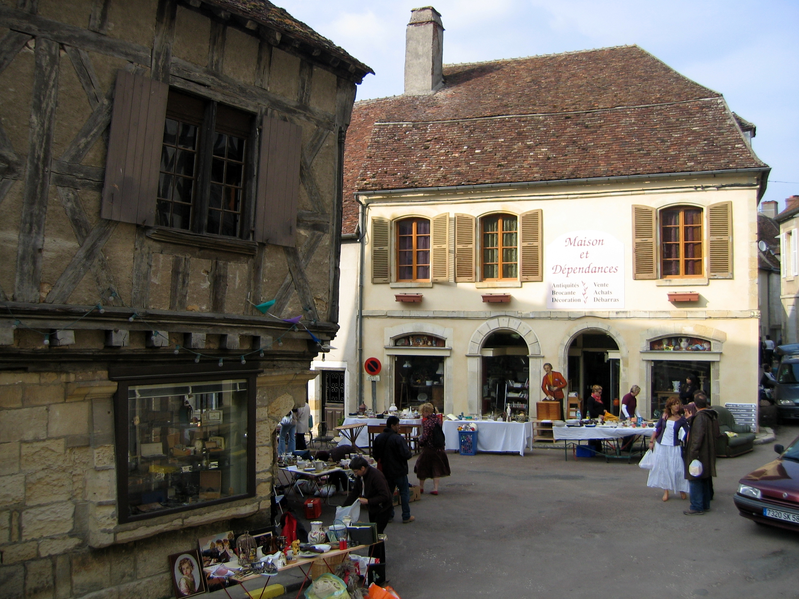 Vue du vieux Donzy lors de la brocante de Pâques